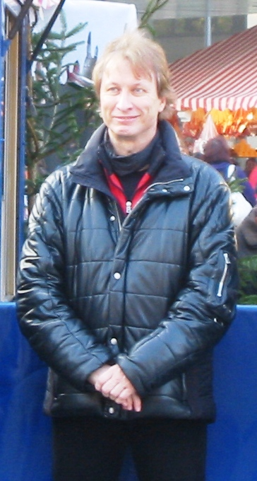 Norbert Schramm, ehemaliger Eiskunstläufer bei der Eröffnung der Winterwelt am Potsdamer Platz in Berlin am 5. November 2011.